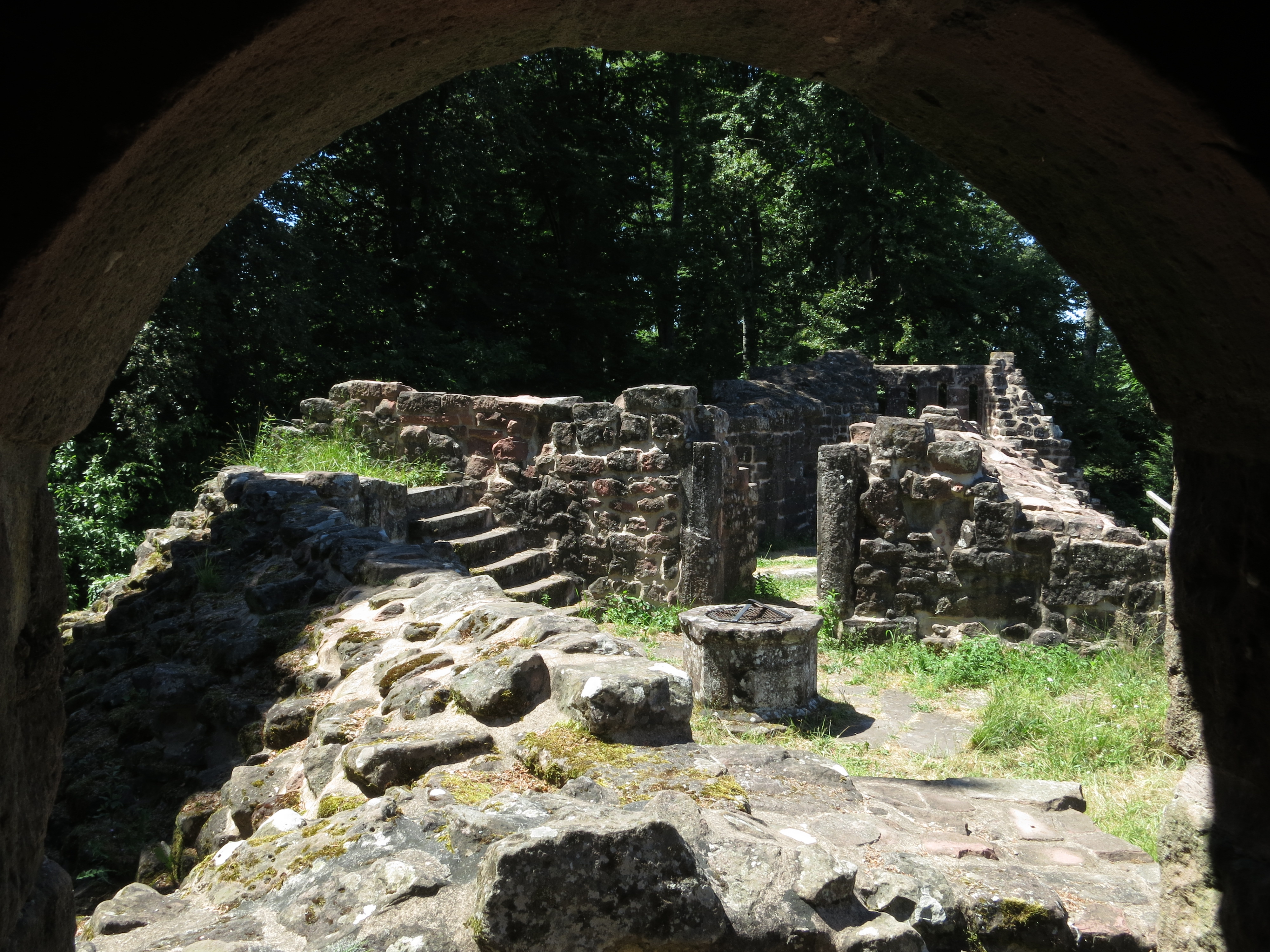 Burgruine Lützelhardt bei Seelbach im Schwarzwald.